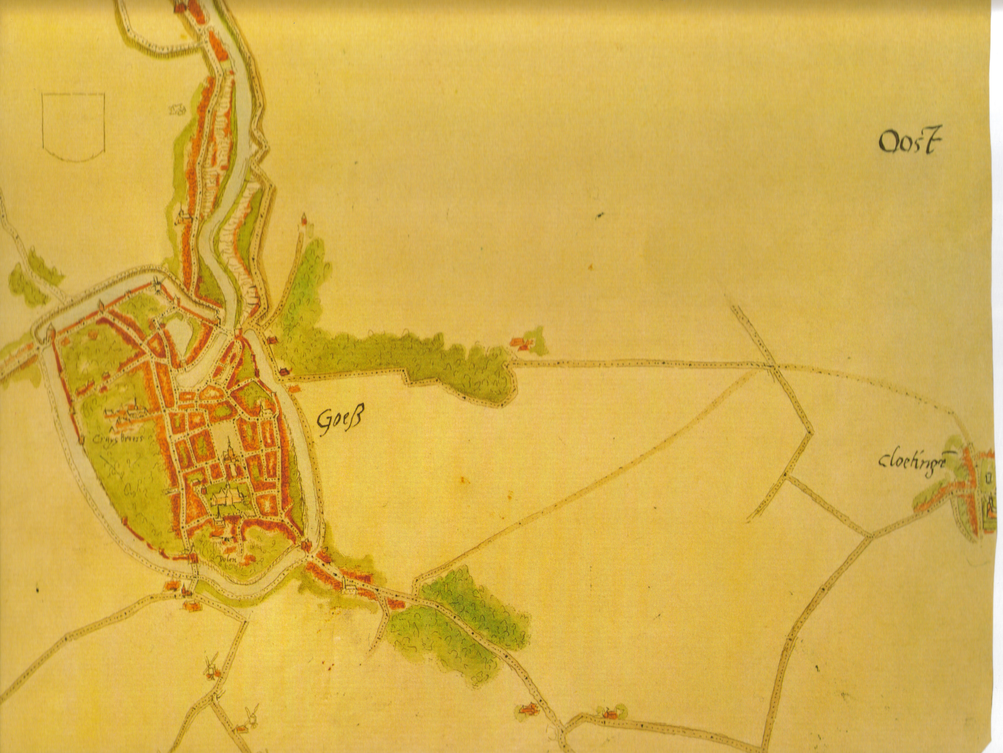 Goes & Cloetinge; Ingescand detail van reproductie van de minuut